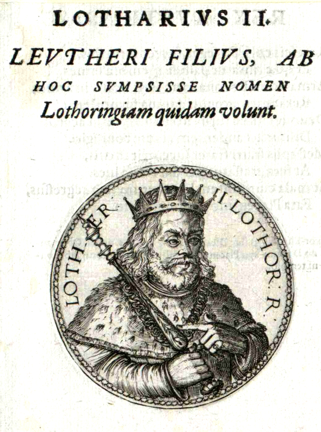 Lothar II., König von Lothringen (um 835 - 869)